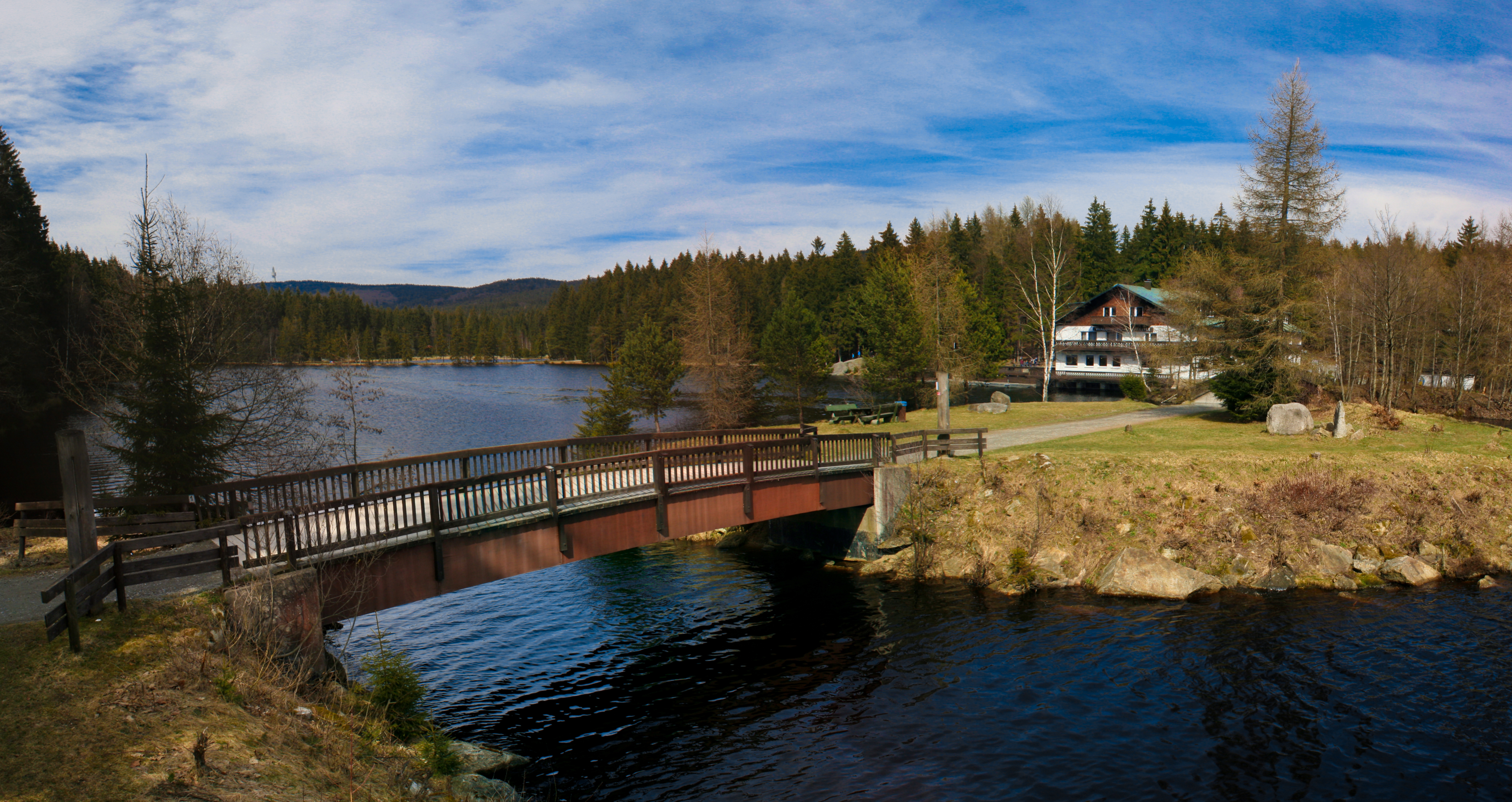 Waldhotel am Fichtelsee